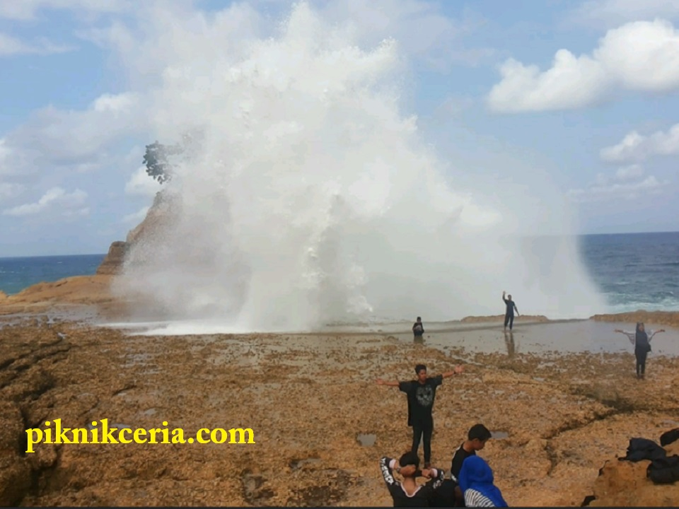 pantai patuk gebang